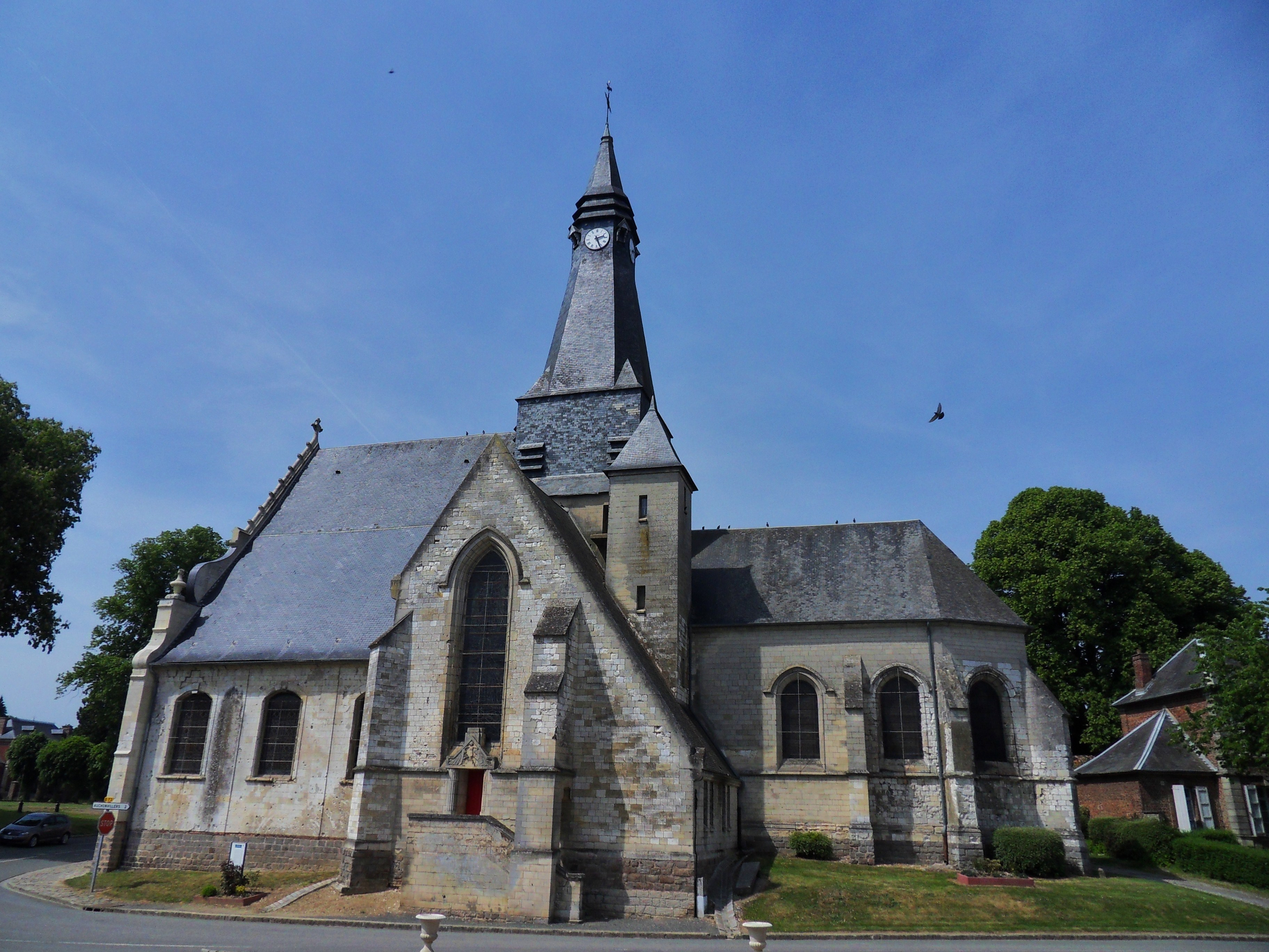 Eglise Saint-Pierre, début du XVIe siècle.